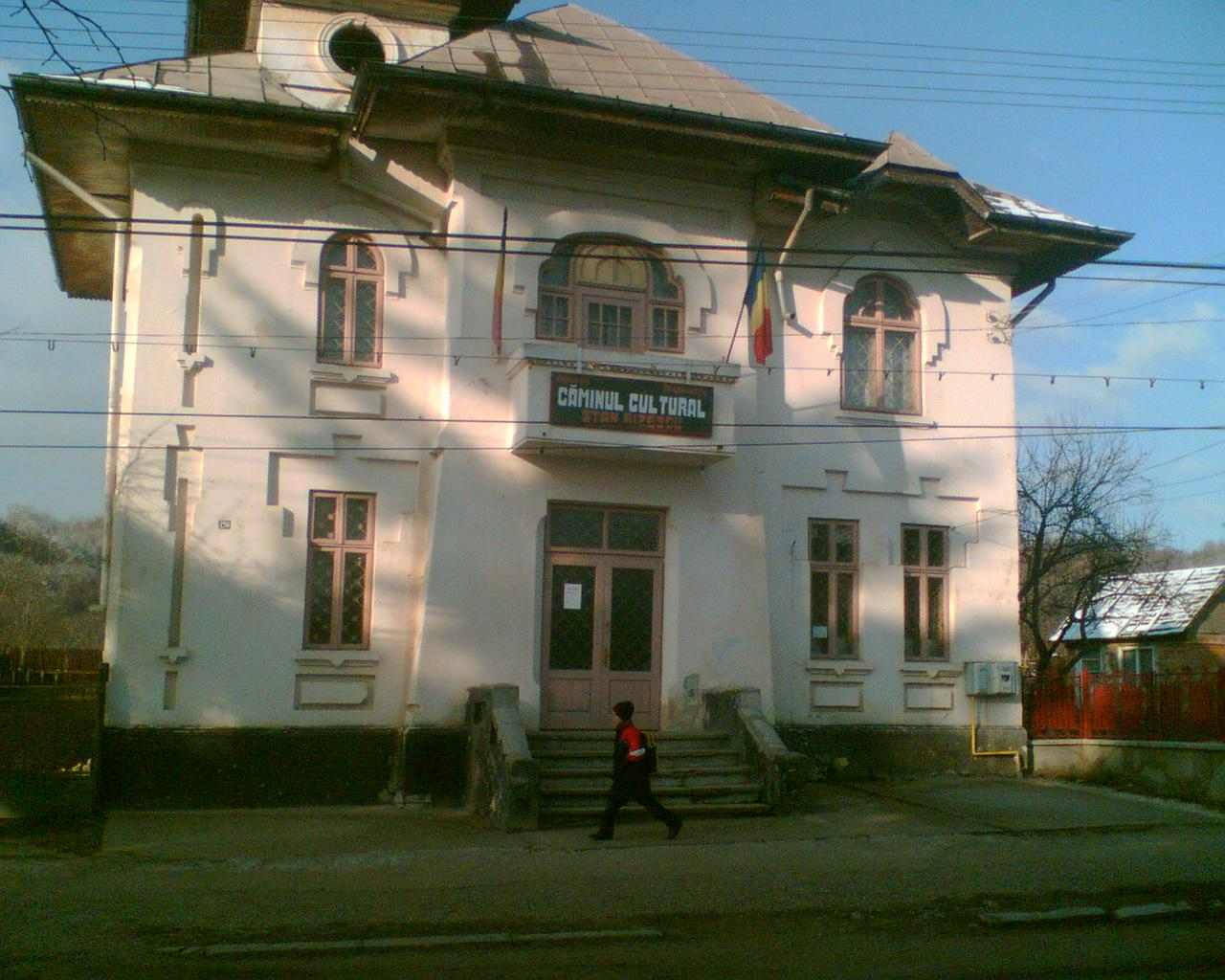 Caminul Cultural Branesti